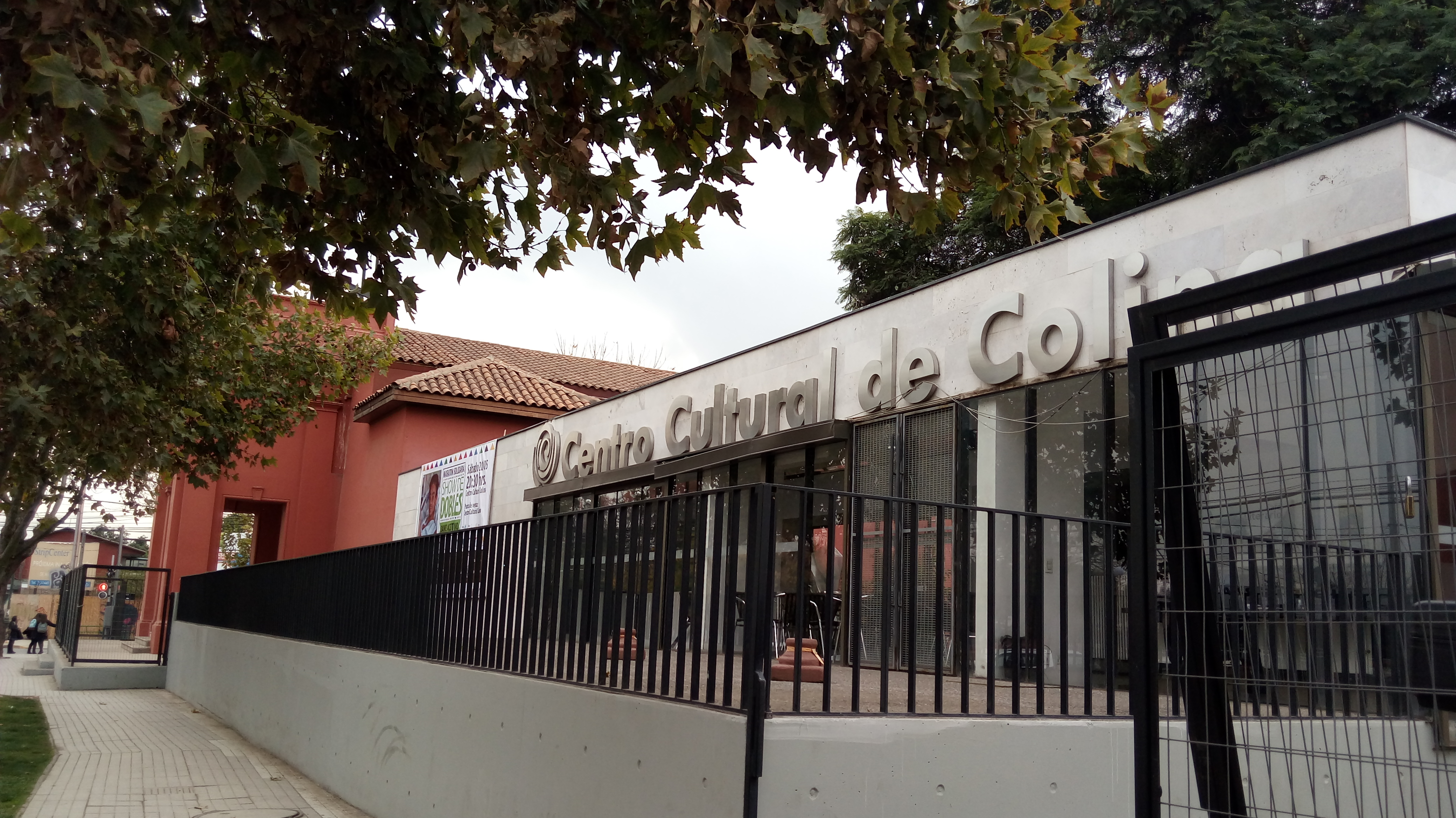 Entrada principal del Centro Cultural de la comuna de Molina